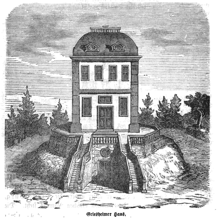 Lithografie: Das Griesheimer Haus oder Jagdhaus Griesheim in seinem ersten Bau von 1713 bis 1736. Aus: Philipp Alexander Ferdinand Walther: Darmstadt wie es war und wie es geworden, Hofbuchhandlung G. Jonghaus, Darmstadt 1865, S. 184